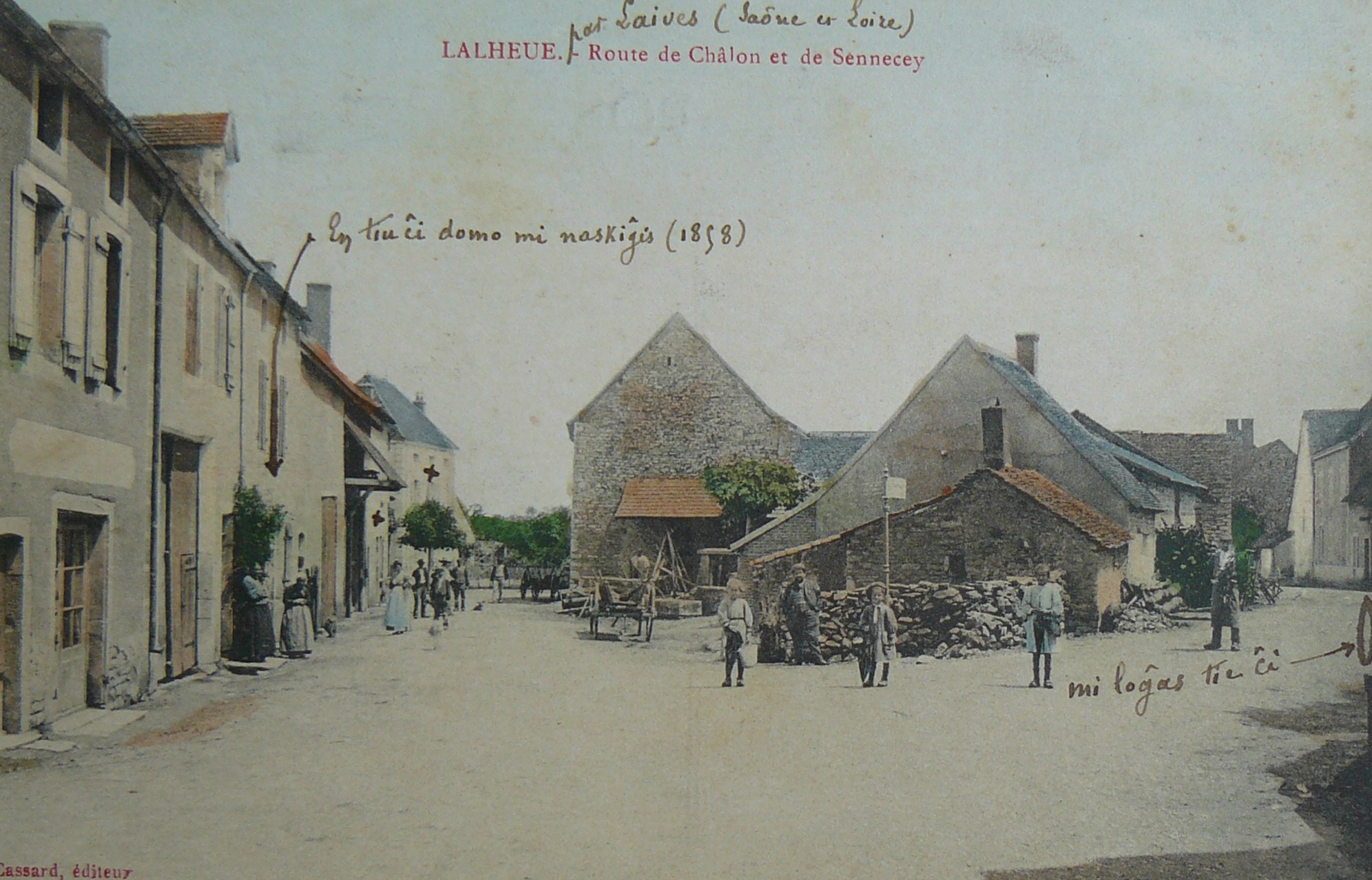 Carte postale ancienne de Lalheue expédiée en 1916 par Ernest Bord, rédigée en espéranto.